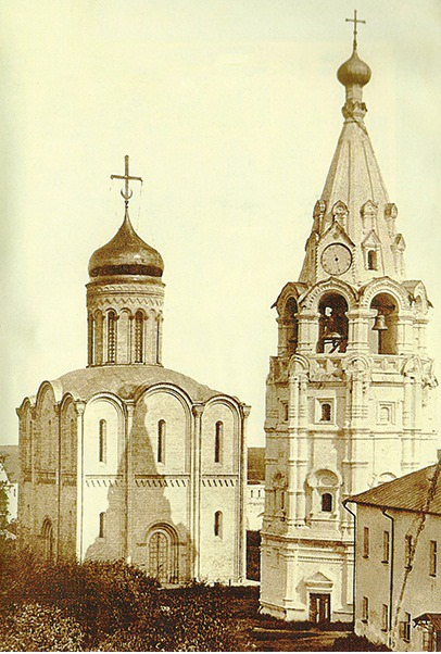 Nativity Cathedral in VladimirСобор Богородице-Рождественского монастыря после восстановления в домонгольских формах по проекту Артлебена (1859-64)